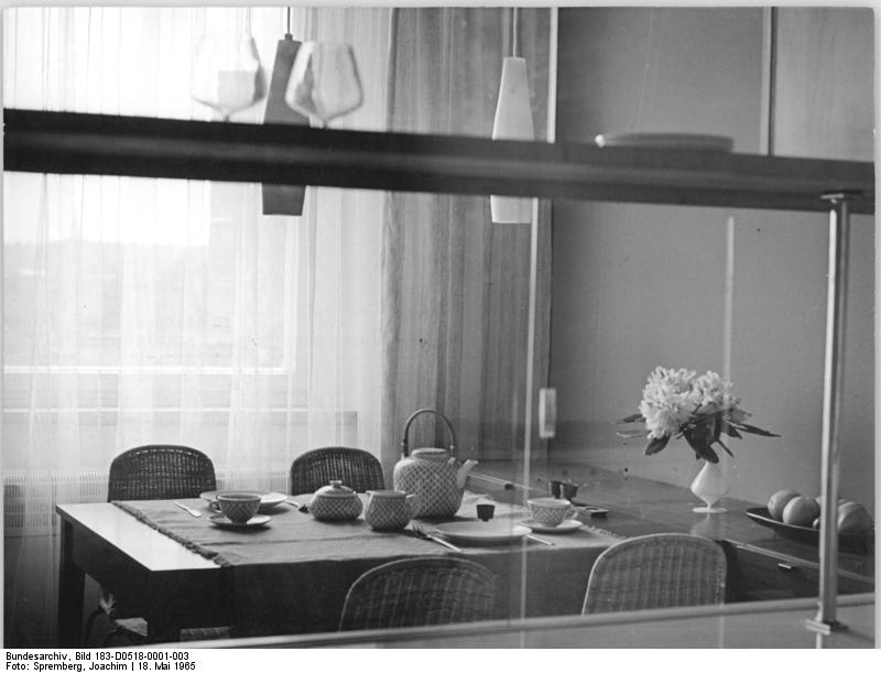 Berlin, Musterwohnung, Essecke Zentralbild Spre-Pr 18.5.1965 Wohnungsaustellung im Experimentalbau Storkower Straße. 17 Wohnungen des fünfgeschossigen Experimentalbaues p 2-12 der Deutschen Bauakademie in der Storkower Straße wurden am 15.5.1965 komplett möbliert der Bevölkerung als Teil der Bauausstellung "investbau 65" vorgestellt. UBz: Zu den Neuhteiten des Experimentalbaus gehören die dem Wohnraum angeschlossenen Innenküchen und die eingebauten Badzellen. Unser Bild zeigt einen Blich durch die Glastrennwand auf den Eßplatz im Wohnraum. Information added by Wikimedia users.Korrekte Bezeichnung ist Experimentalbau P2/5, Berlin-Fennpfuhl. Innenausstattung einer Wohnungseinheit von Rudolf Horn (Entwurf 1962)